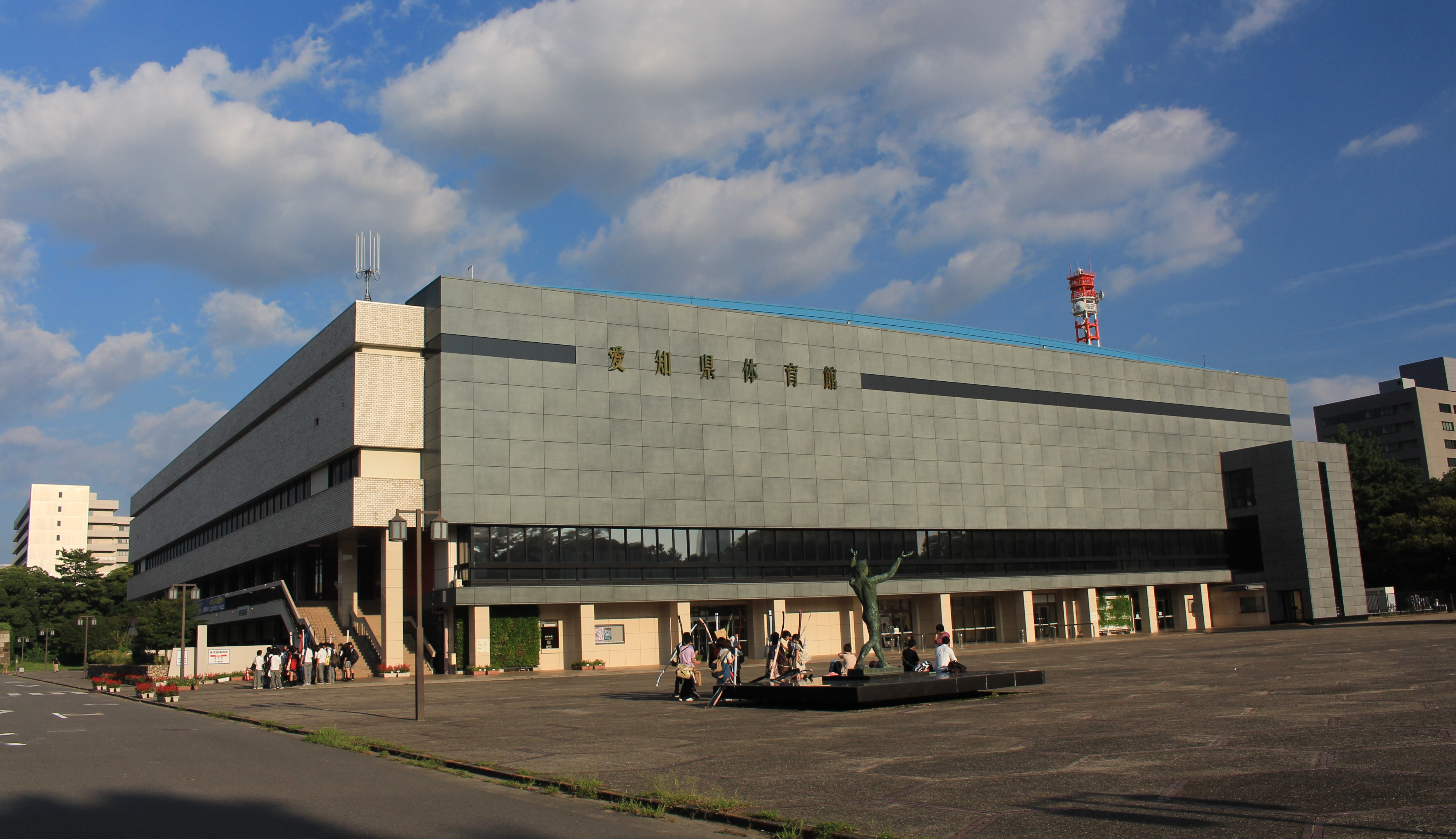 愛知県体育館、愛知県名古屋市中区二の丸1-1